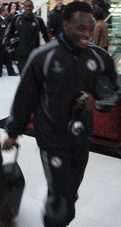 Michael Essien